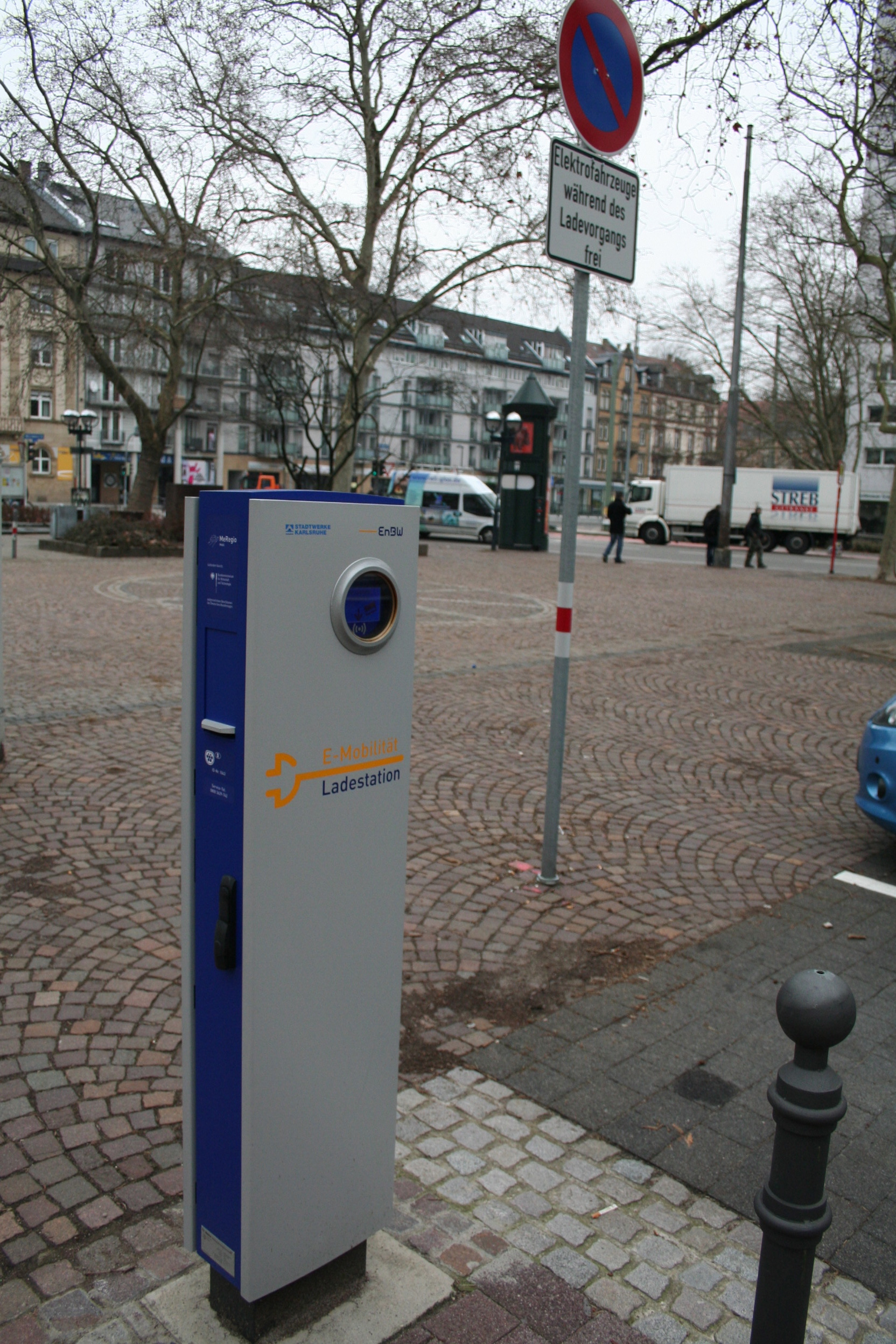 Eine Ladestation für Elektrofahrzeuge der Energie Baden-Württemberg (EnBW). Ort: Karlsruhe, Gottesauer Platz